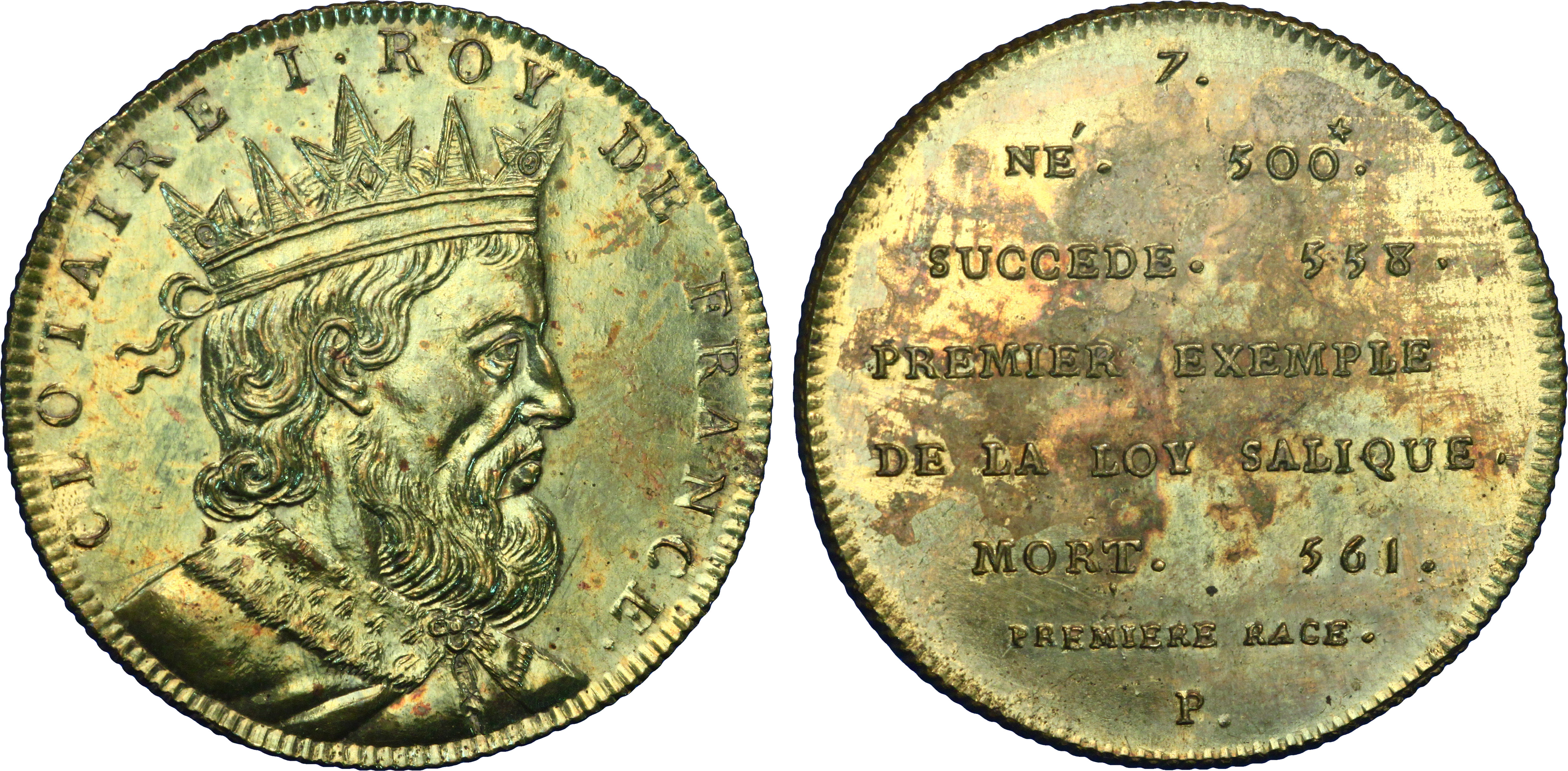 Métal : laiton Diamètre : 32mm Axe des coins : 12h. Poids : 15,74g. Tranche : cannelée Degré de rareté : R1 Titulature avers : CLOTAIRE I ROY DE FRANCE. Description avers : Buste imaginaire drapé et couronné à droite. Titulature revers : 7 - NÉ 500* - SUCCEDE 558 - PREMIER EXEMPLE DE LA LOY SALIQUE - MORT 561 - PREMIERE RACE / P.. Description revers : en neuf lignes.